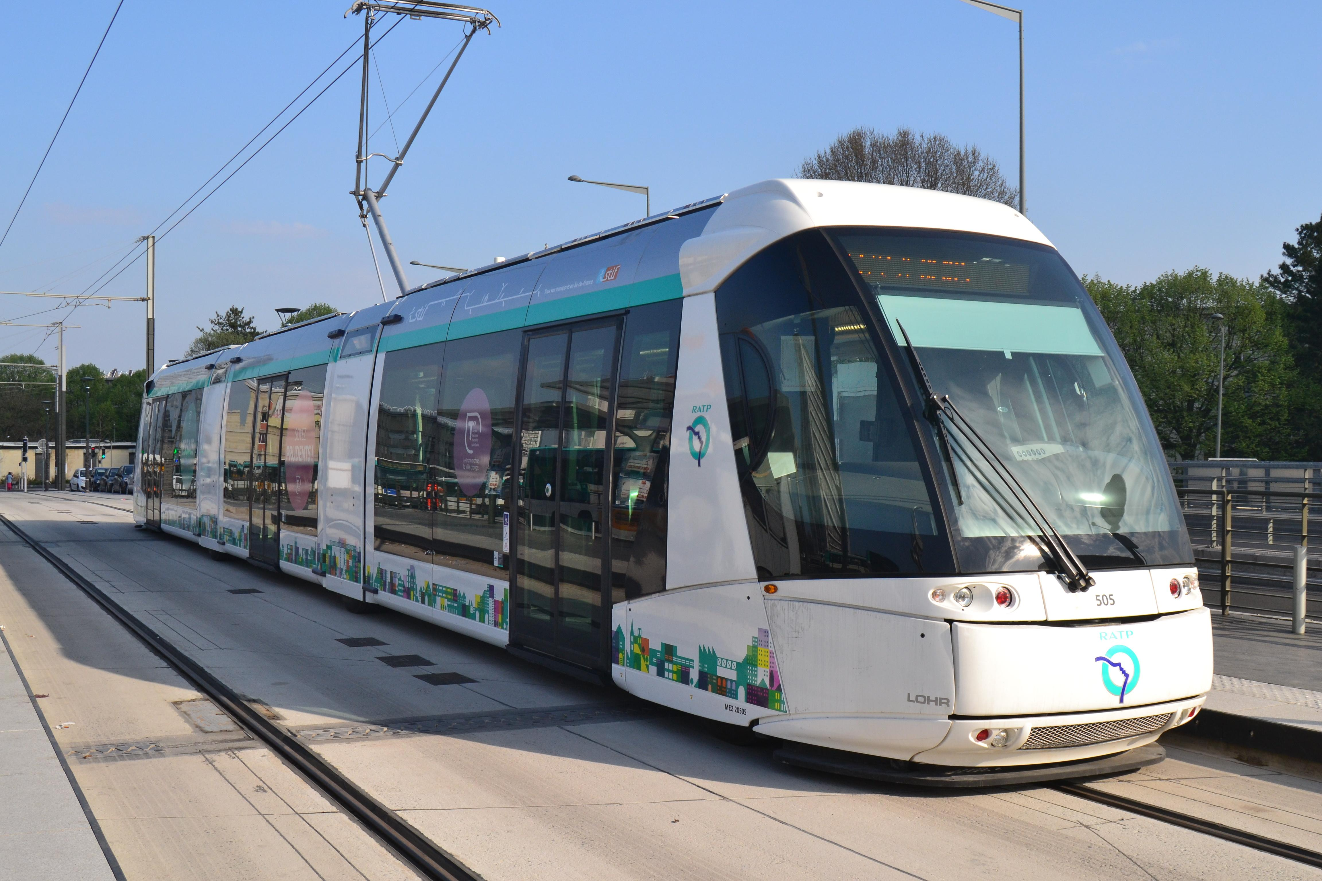 ligne T5 essais mois de mai 2013